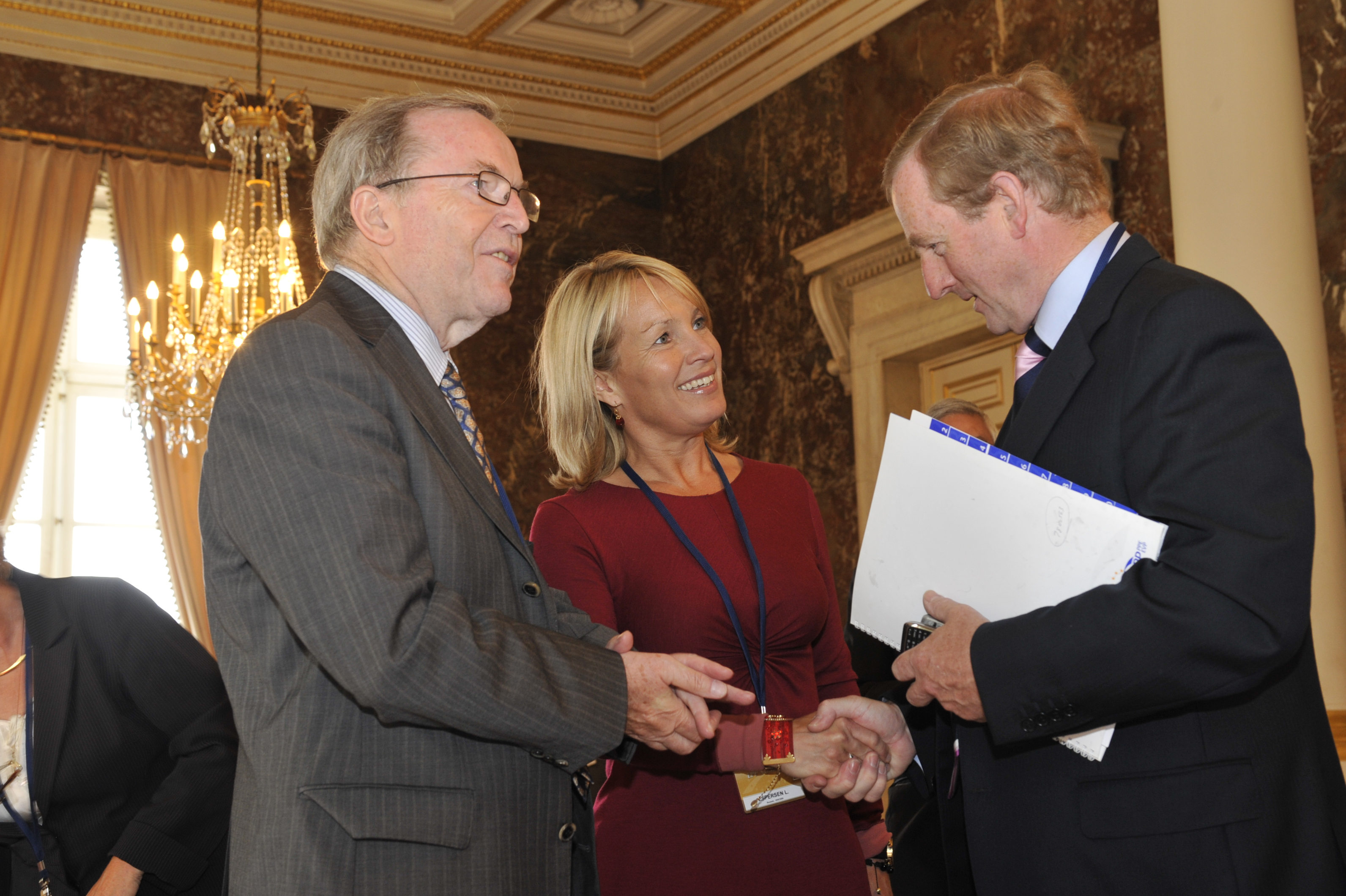 EPP Summit 18 June 2009